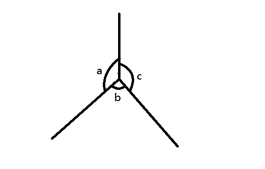 angle at a plant